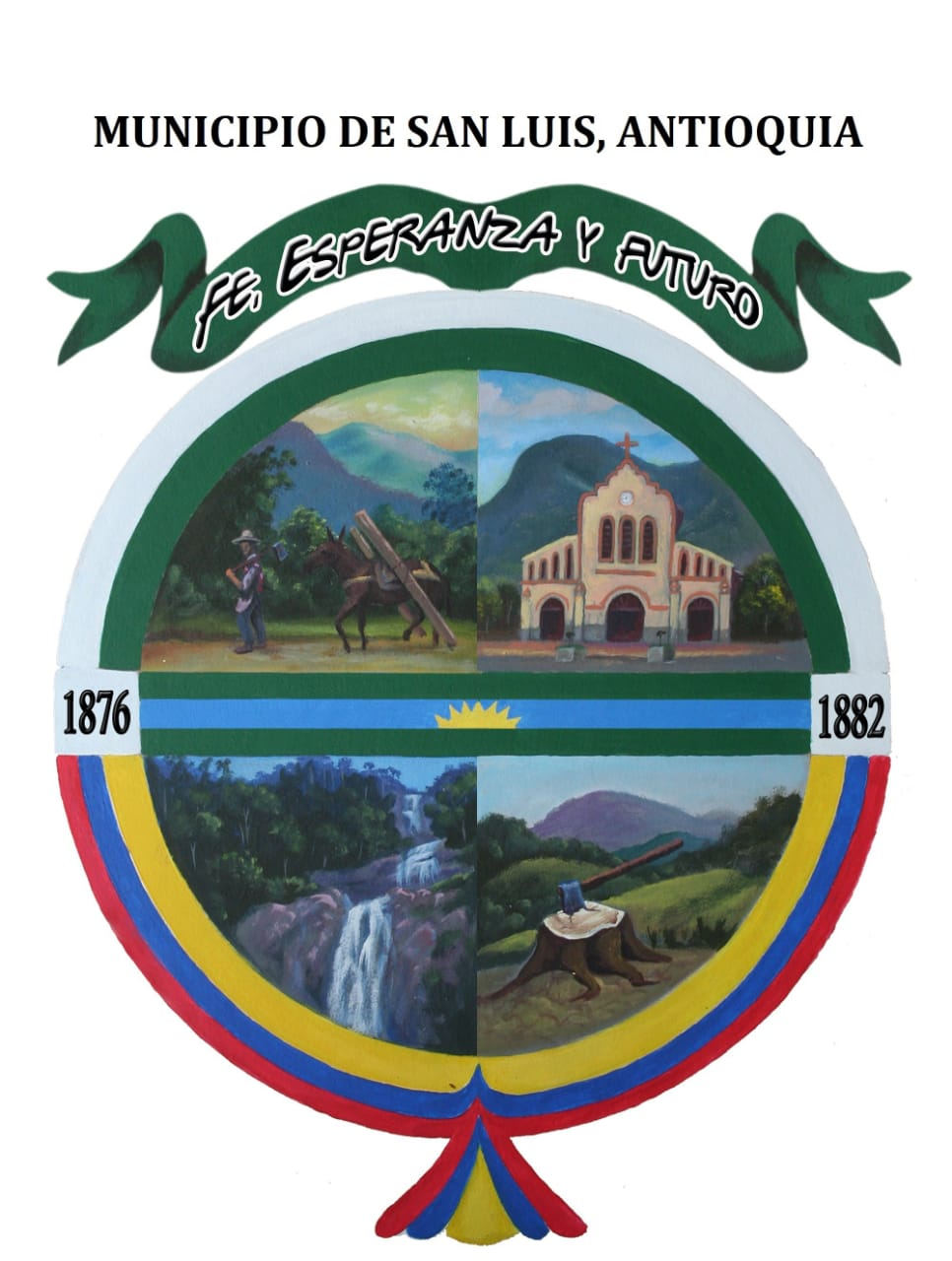 Escudo del Municipio de san Luis antioquia creado y diseñado por Ramón Eduardo Gomez çen concurso, convocatoria del Honorable concejo Muncipal y la administración del entonces Alcalde Julio Martinez en el año de 1990 . (Dirección de Cultura y emprendimento de san Luis Antioquia)